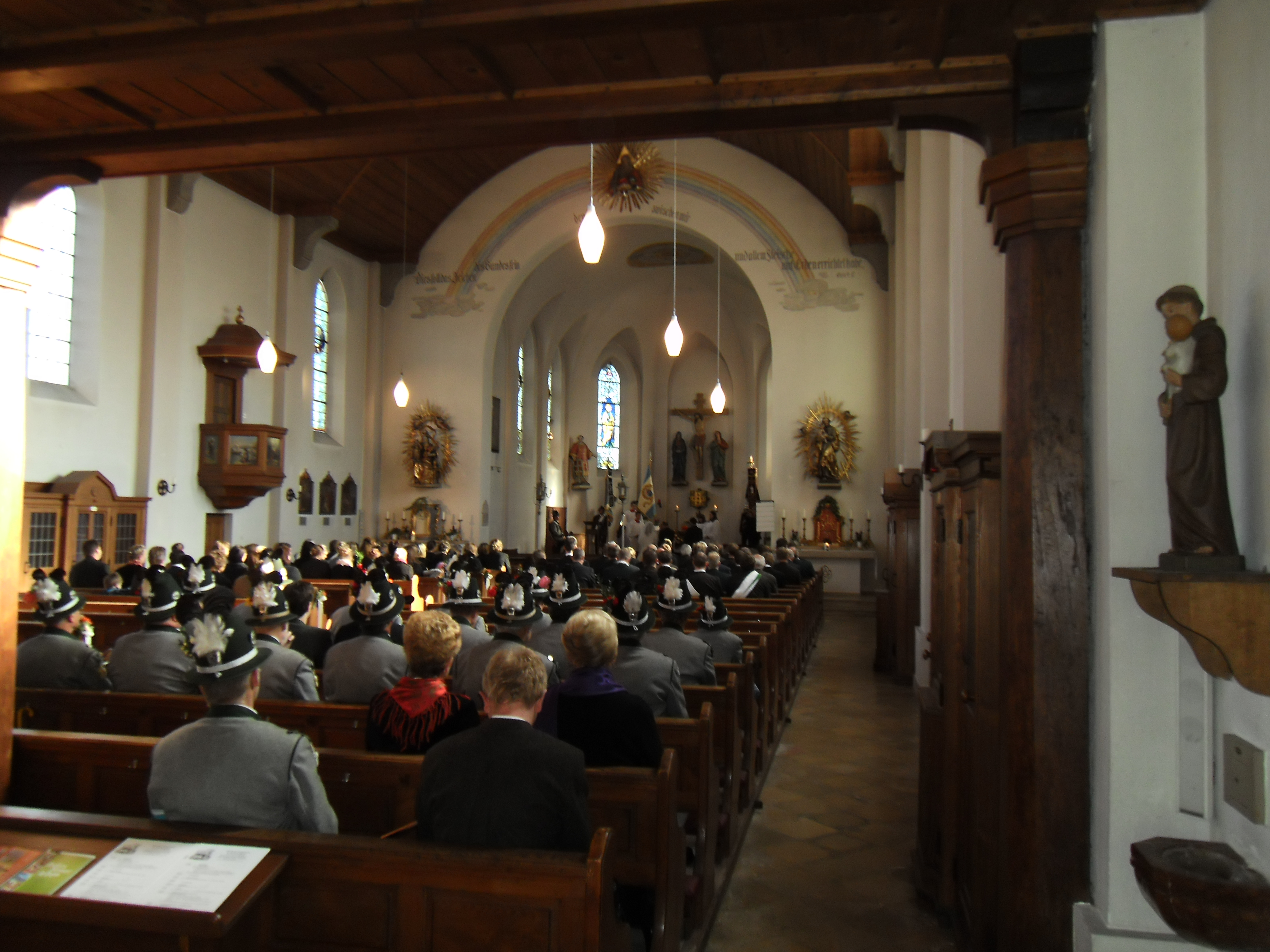 Bernau am Chiemsee. Samstagvormittags-Messe der Katholischen Pfarrgemeinde St. Laurentius Bernau.